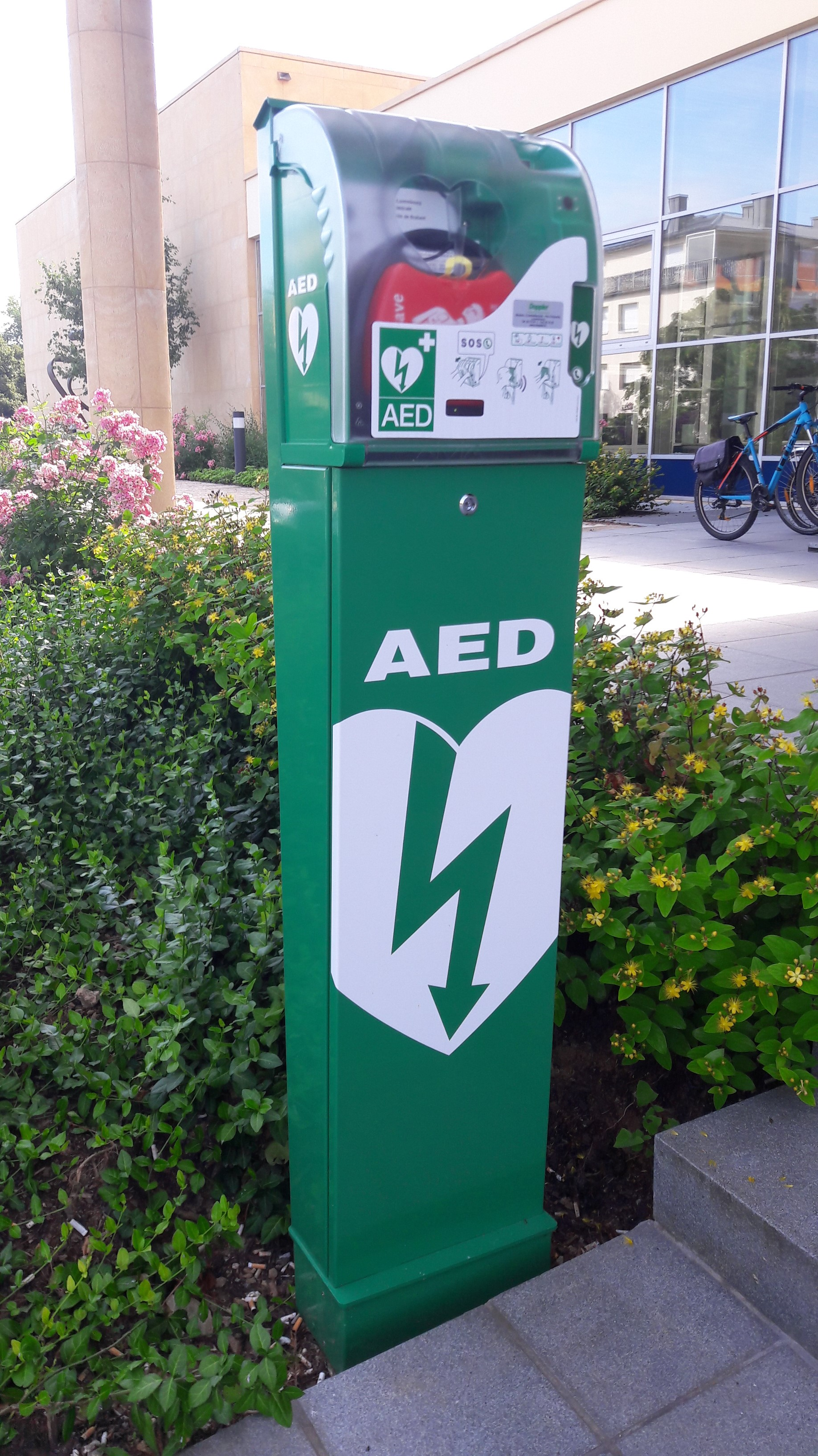 Den ëffentlech zougänglechen Defibrillator vum Kolléisch steet virun der Entrée rue Marguerite de Brabant